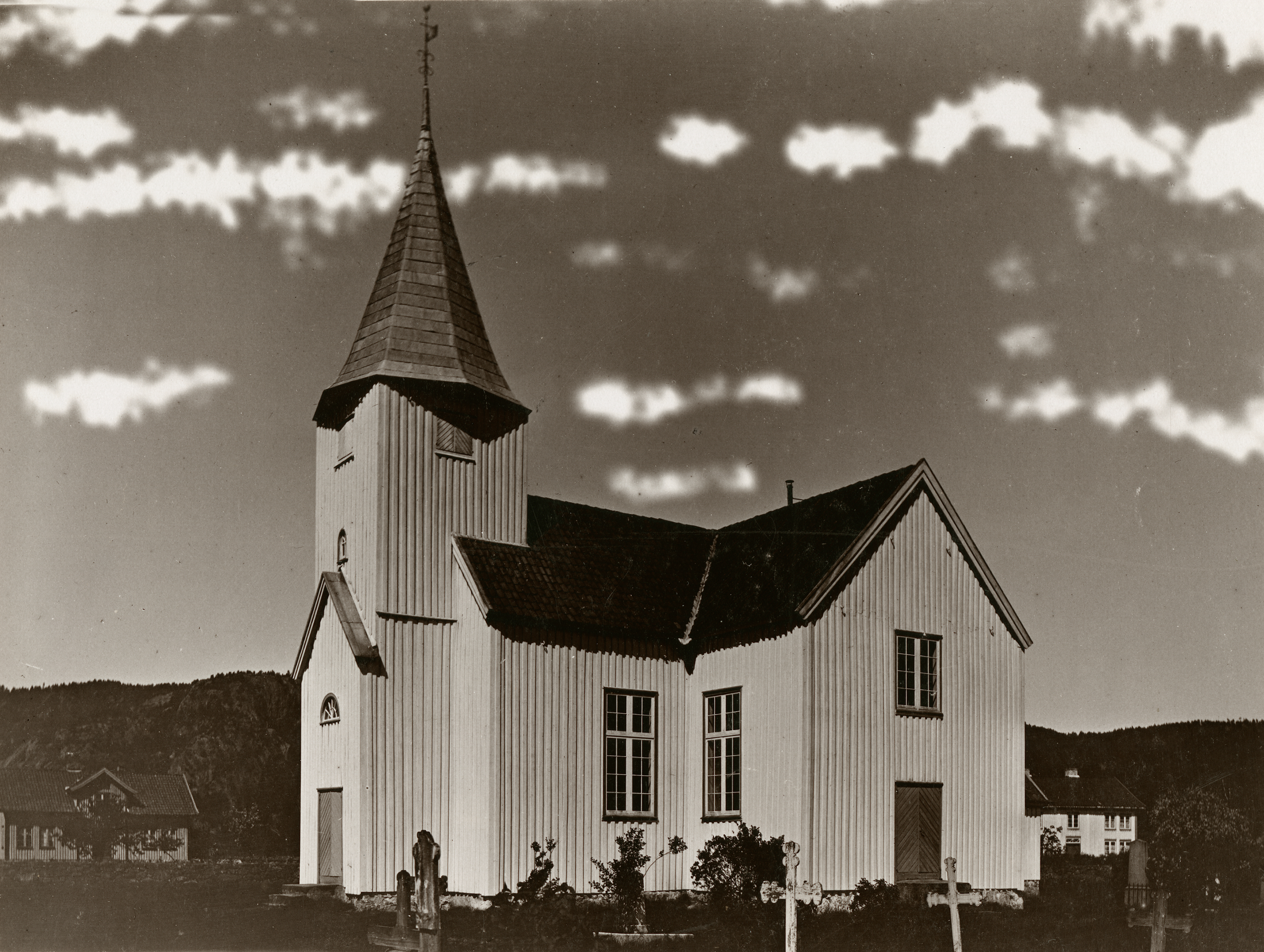 Øyslebø kirke i Øyslebø, Vest-Agder This image on crowdsourcing geotagging platform Fotodugnad